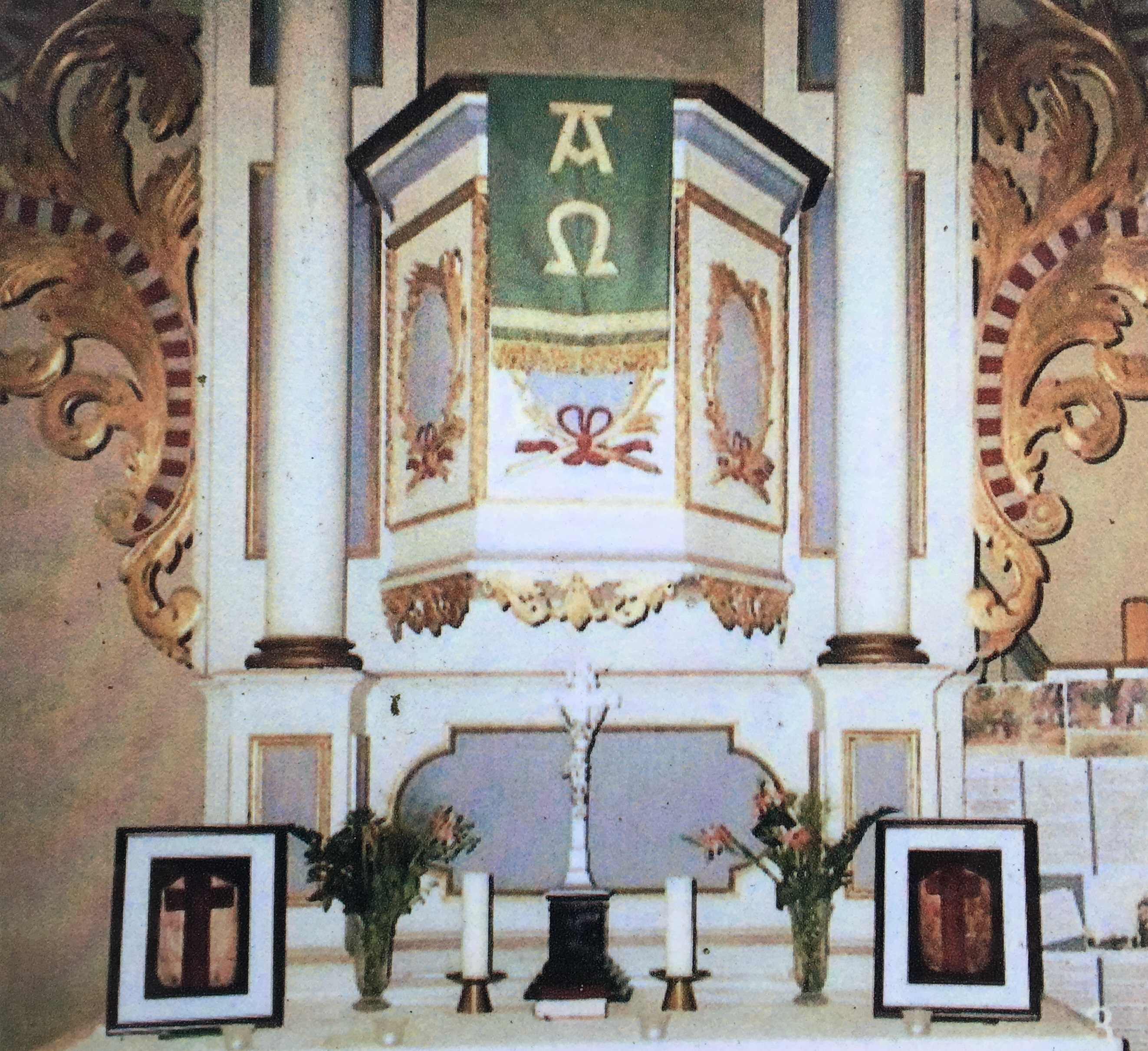 Die Dorfkirche Brachwitz ist eine spätgotische Saalkirche in Brachwitz, Stadt Treuenbrietzen im Landkreis Potsdam-Mittelmark. Sie wurde überwiegend aus Raseneisensteinen errichtet. In ihrem Innern steht unter anderem ein Kanzelaltar aus der ersten Hälfte des 18. Jahrhunderts. Aufnahme auf einer öffentlich zugänglichen Informationstafel östlich des Bauwerks.